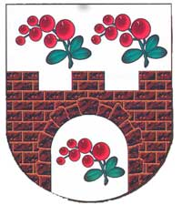 Herb miasta Szarkowszczyzna